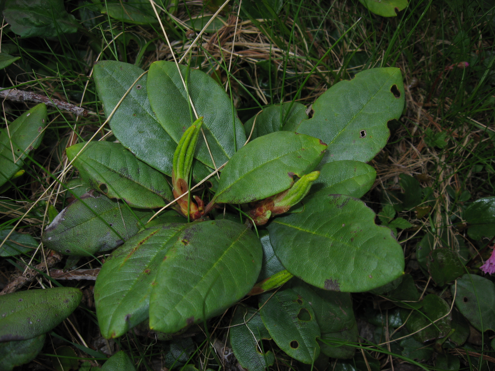 キバナシャクナゲ (Rhododendron aureum)